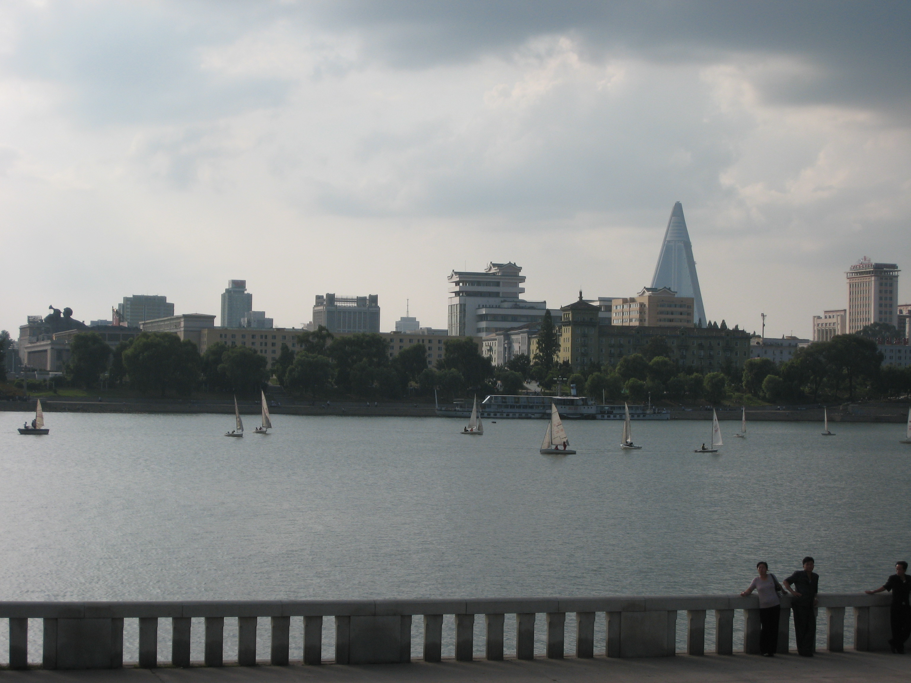 中文（中国大陆）: 大同江和江面上的帆船